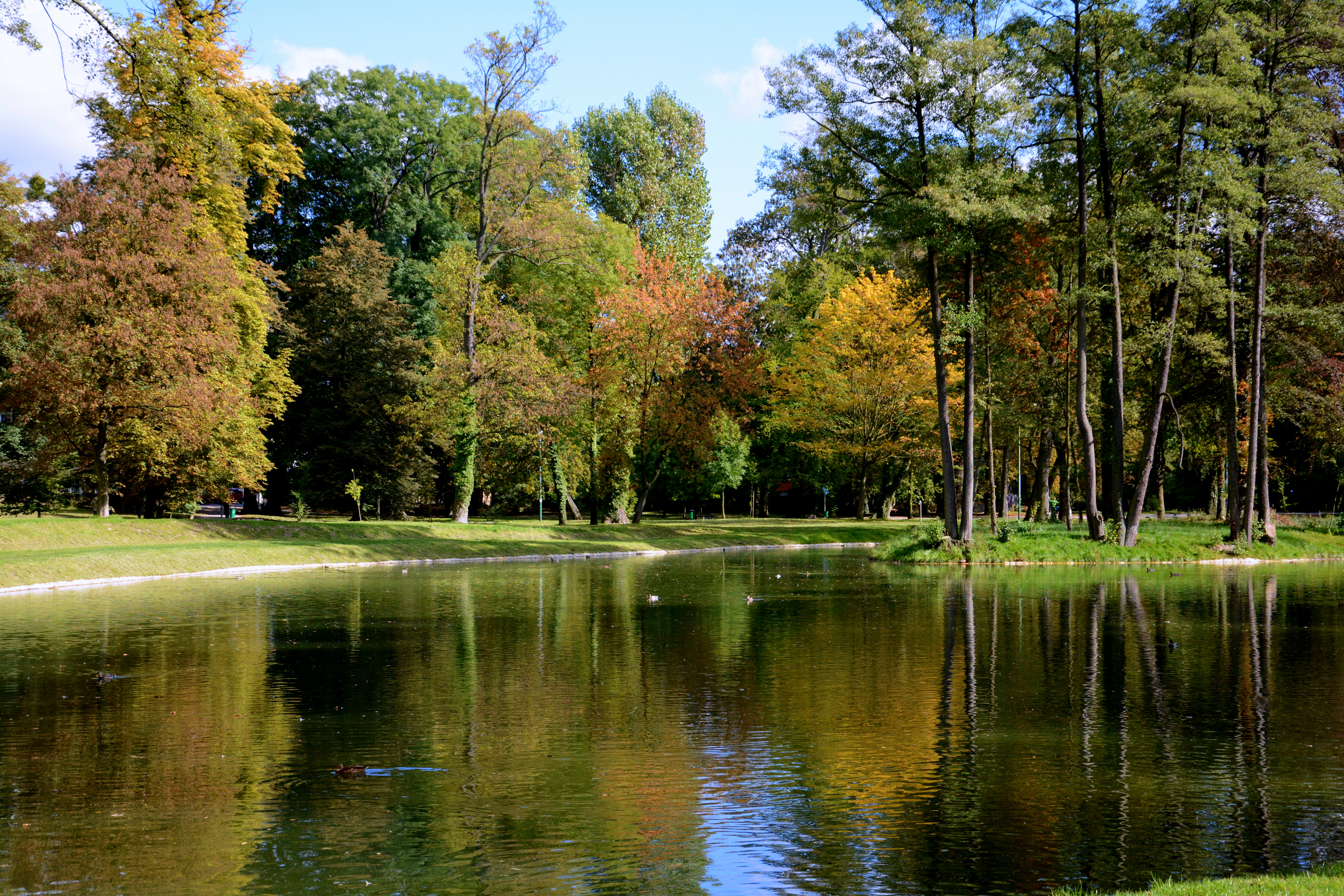 Park w Strzelcach Opolskich, jesień